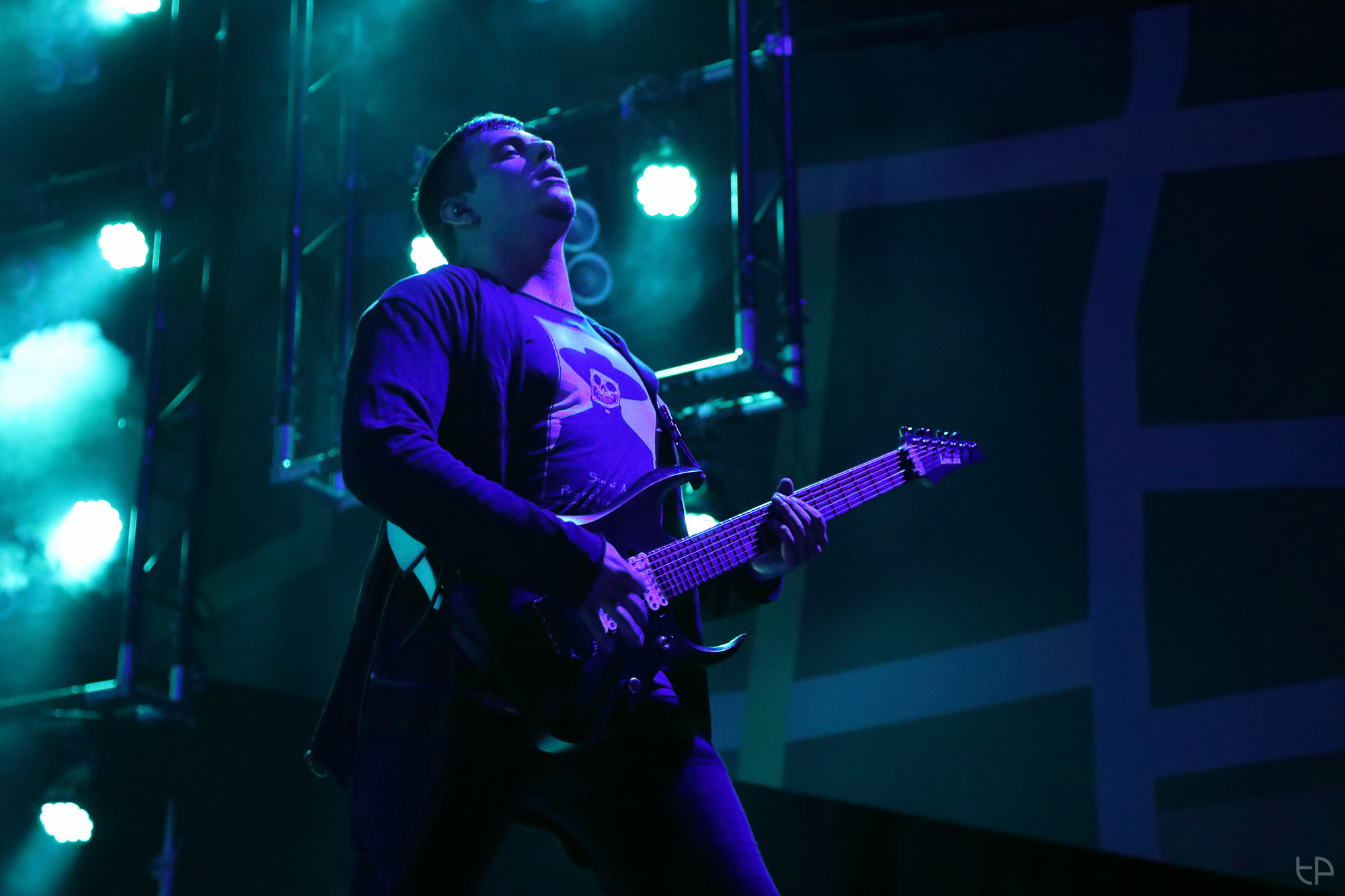 4L8A3167_web